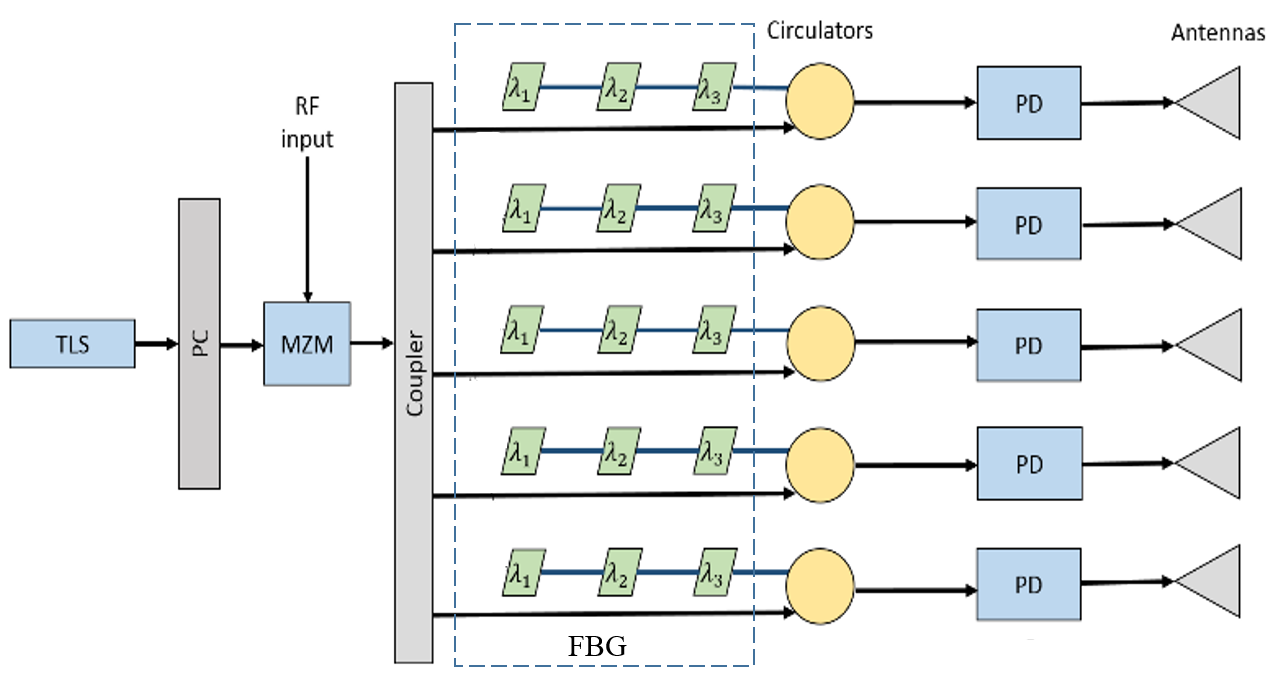 Структурная схема формирования диаграммы направленности антенной решетки на основе волоконной брэгговской решётки, где TLS - настраиваемый лазерный источник, MZM - модулятор Маха-Цендера, PC - коннектор, PD - фотодетектор, а FBG - волоконная брэгговская решетка. Схема разработана на основе A Tutorial on Microwave Photonics (IEEE). Используется нами в З. С. Гибалина, В. А. Фадеев. Концепция формирования диаграммы направленности фазовых антенных решеток на основе применения голограммных дифракционных решеток. Журнал радиоэлектроники [электронный журнал]. 2017. №12. Режим доступа